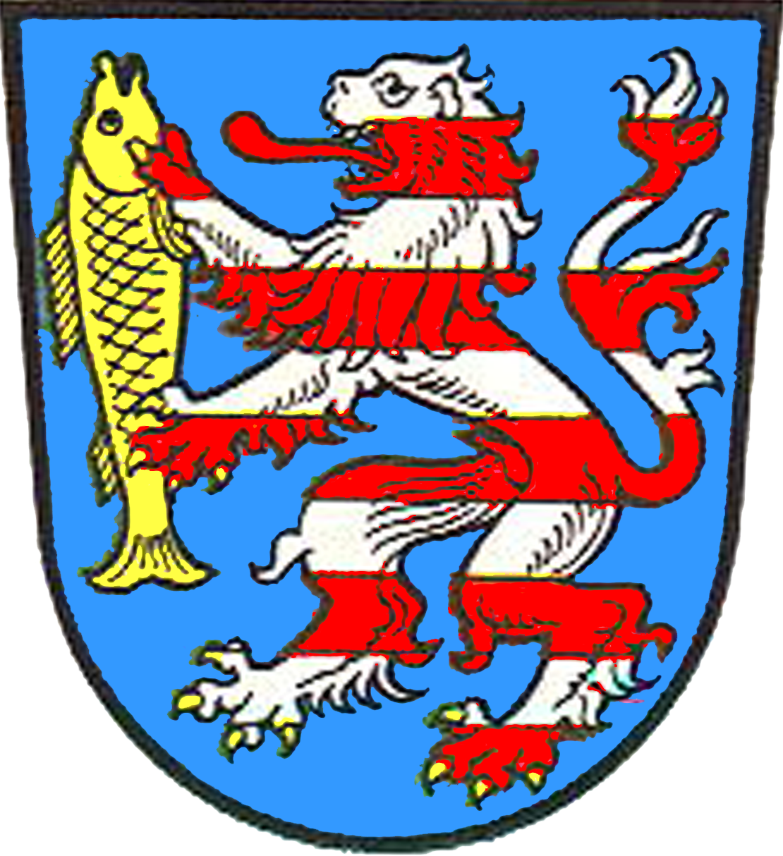 Wappen von Oberweser